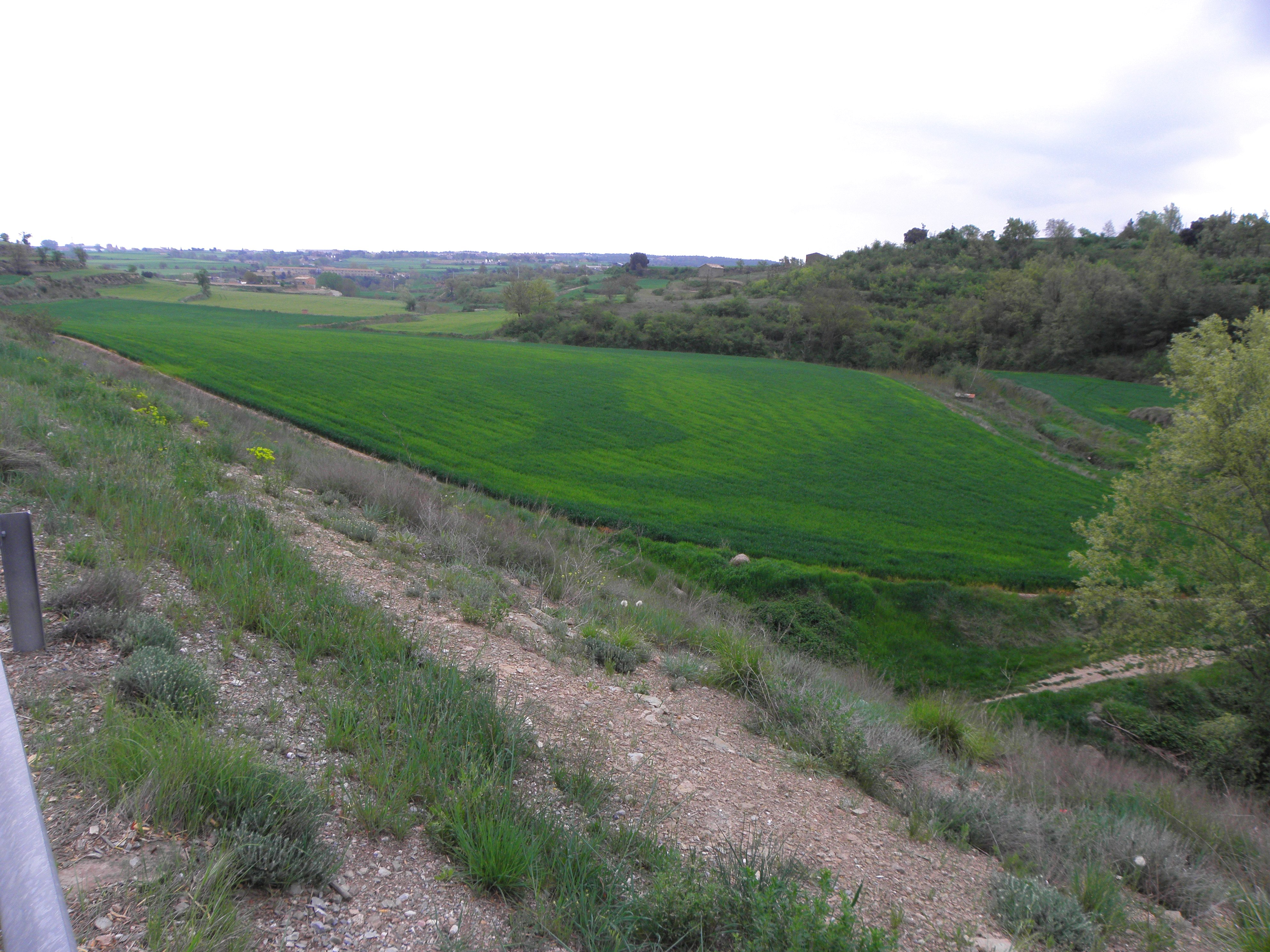 El tram final de la vall del barranc de Ribalta vist des del punt on travessa la carretera C-149, a Solsona (Solsonès).